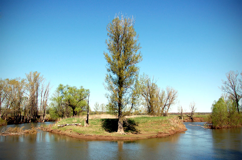 Изгиб реки Бирь, Бирский район, Башкортостан